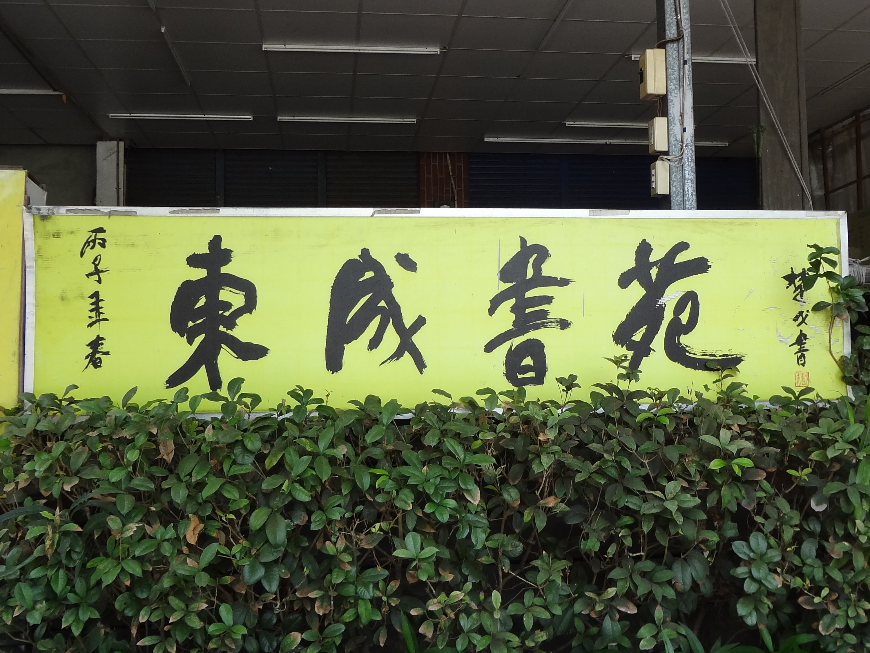 楚戈題字的東成書苑招牌，位於東吳大學外雙溪校區臨溪路。東成書苑是當地住戶經營的書店，與東吳大學並無關聯。